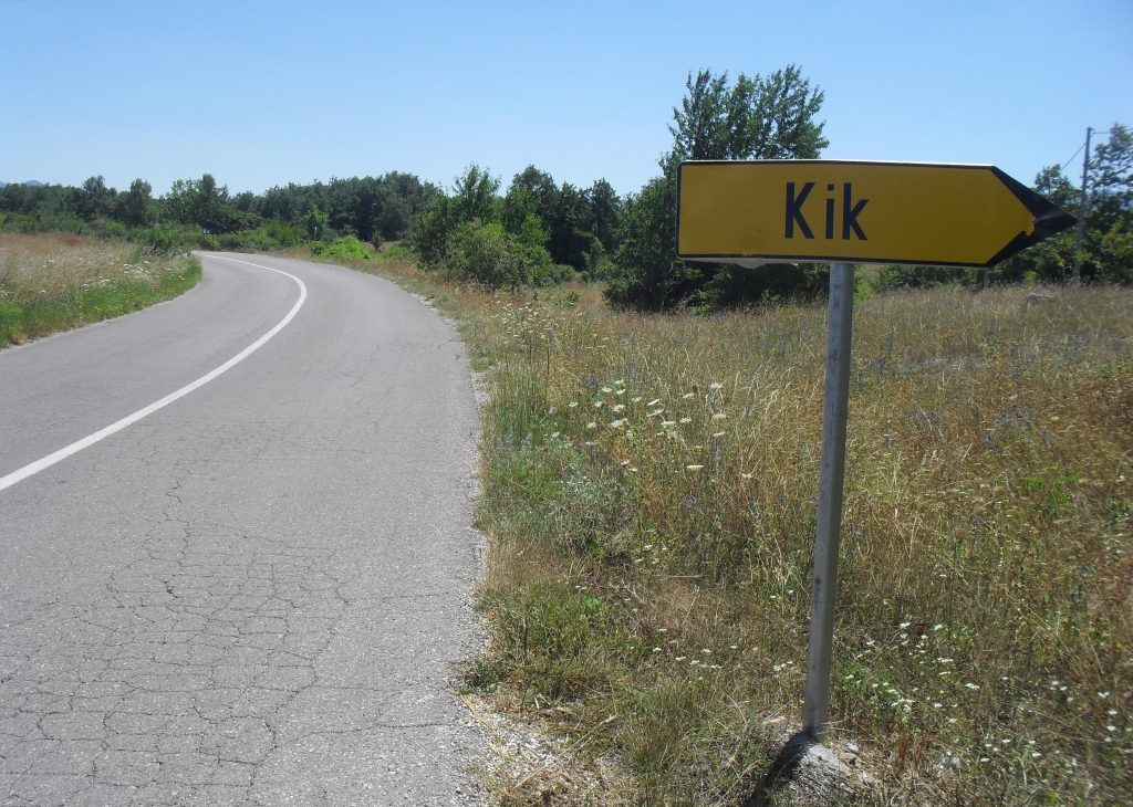 Скретање за Кик из правца Горње Плоче, Лика